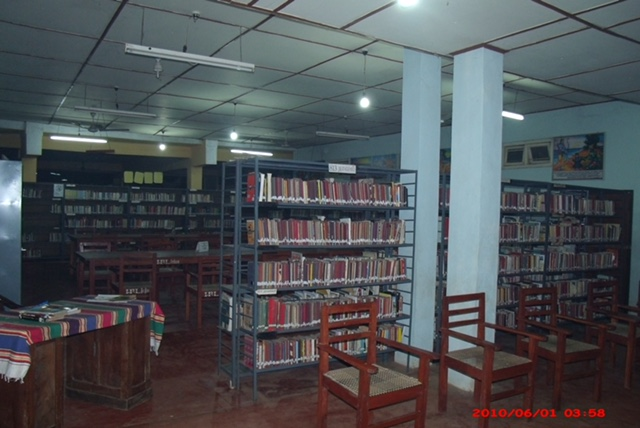 நூலக உட்கட்டமைப்பு தோற்றம்